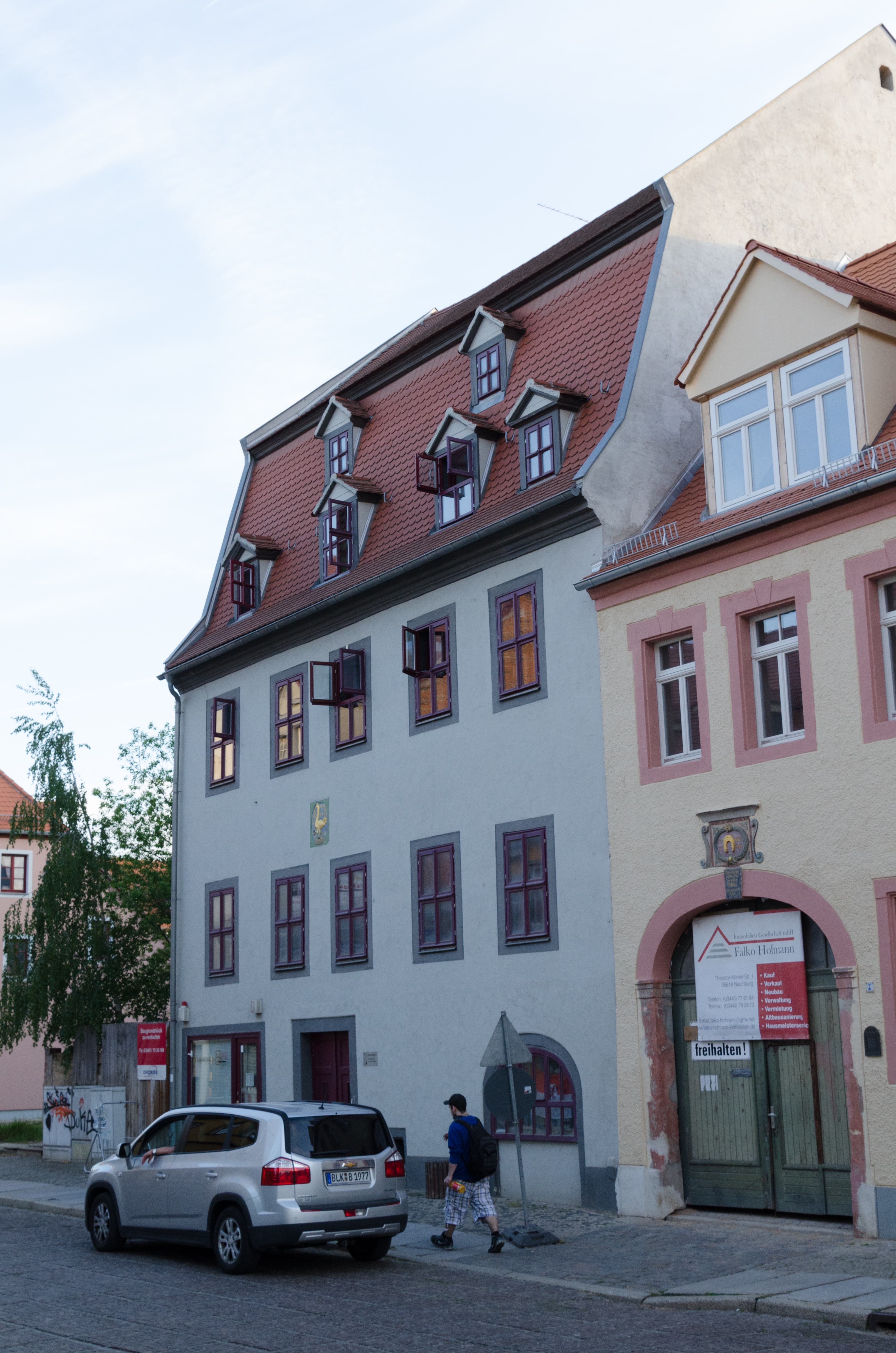 Naumburg, Marienstraße 24